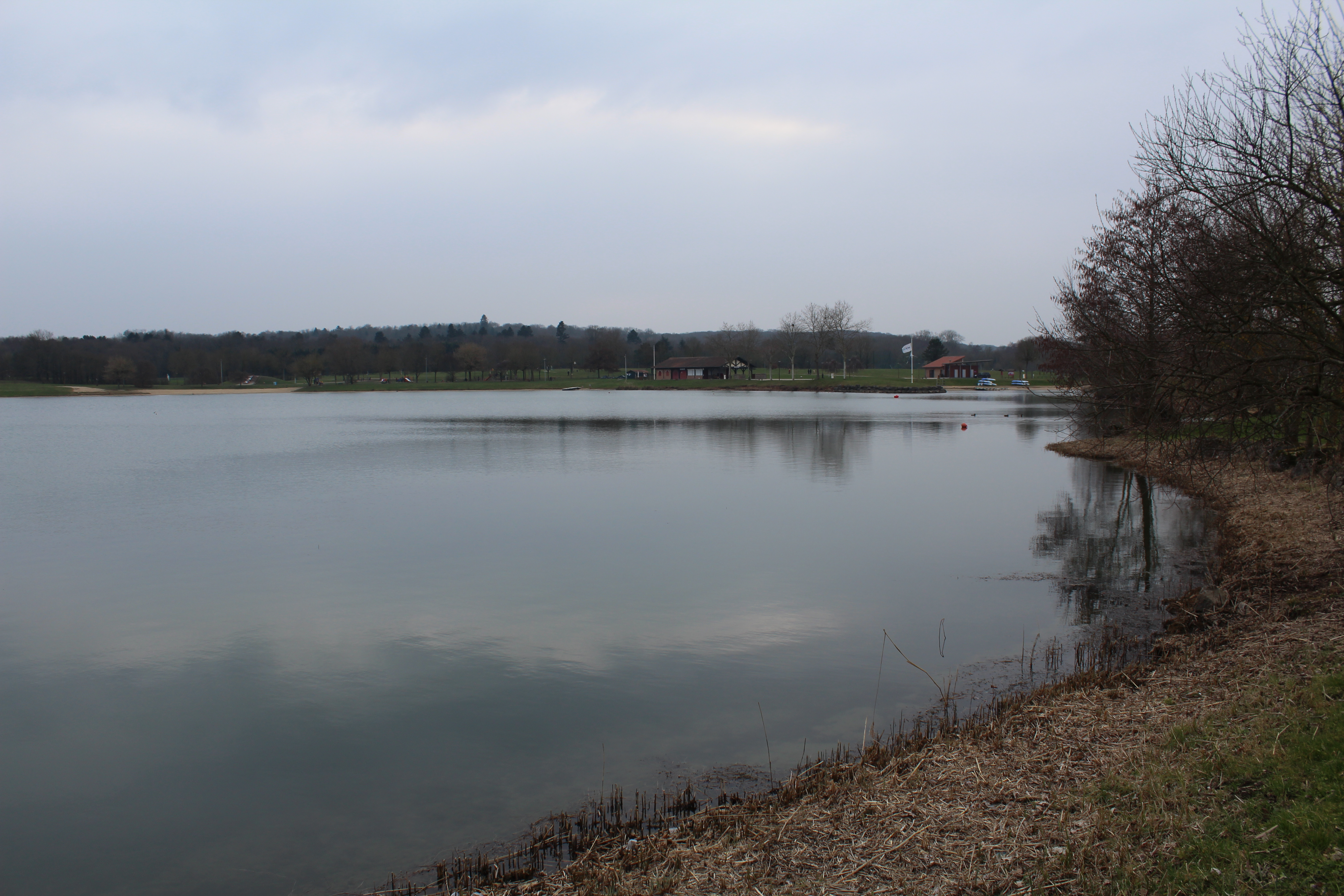 Lac de Bouvent, Bourg-en-Bresse.